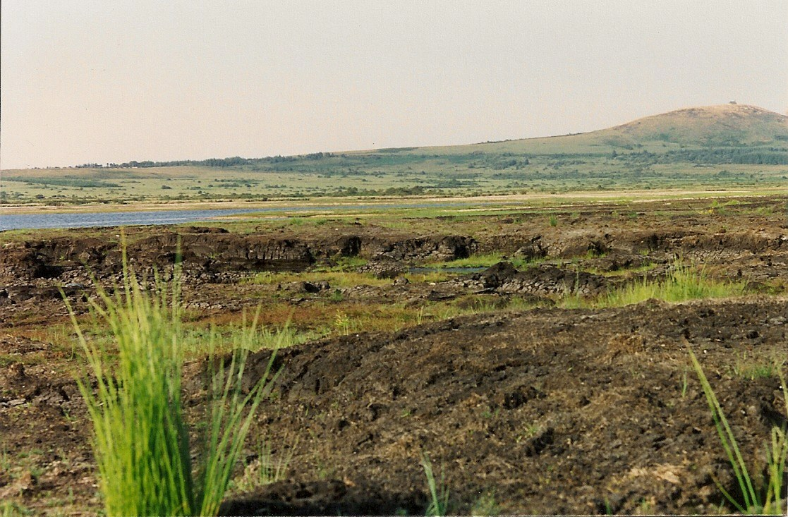 Anciennes fosses de tourbières dans le marais du Yeun Elez